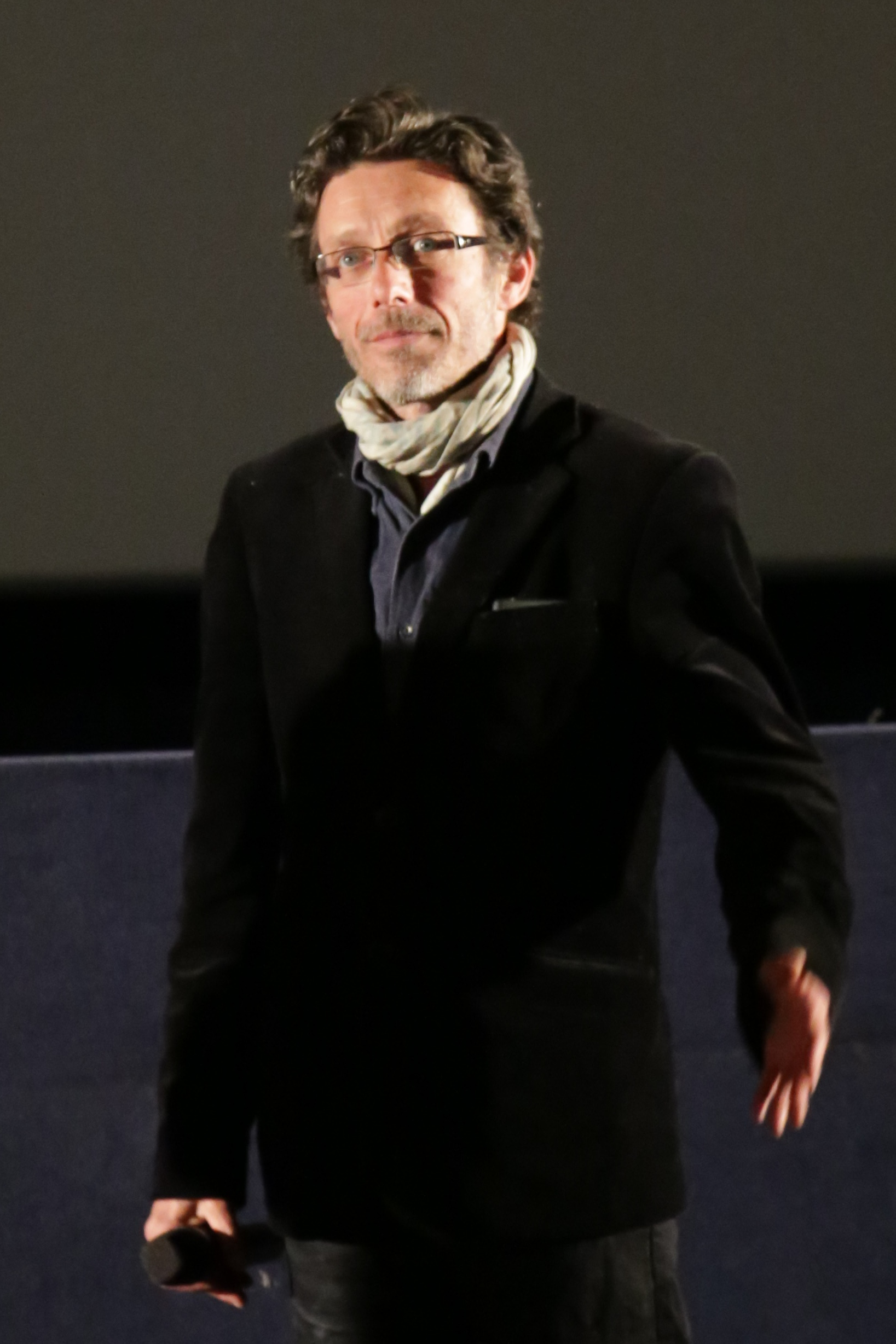 Lors de l'avant première du film "De toutes nos forces"